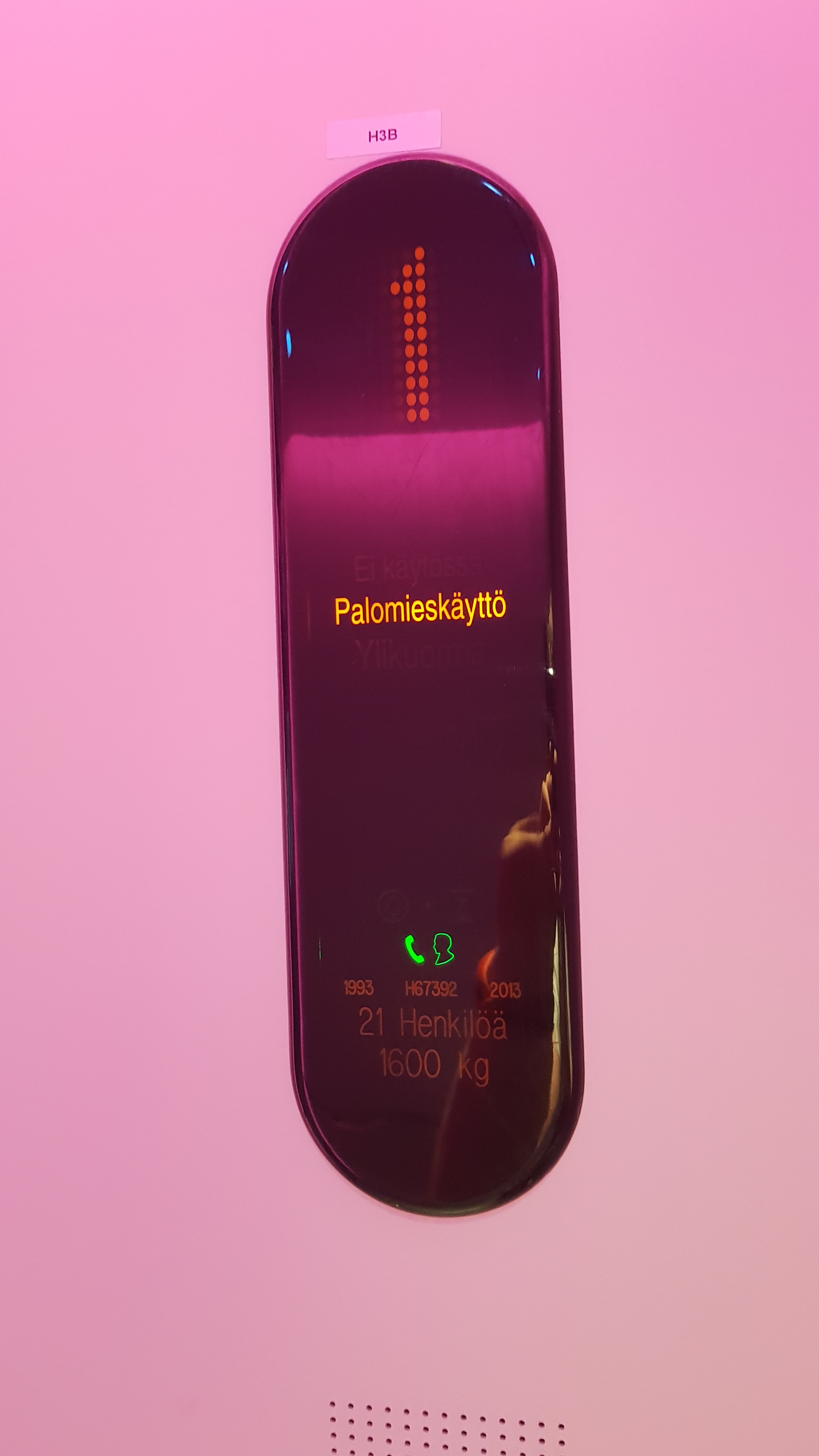 Palomieskäytössä oleva hissi Myyrmannissa